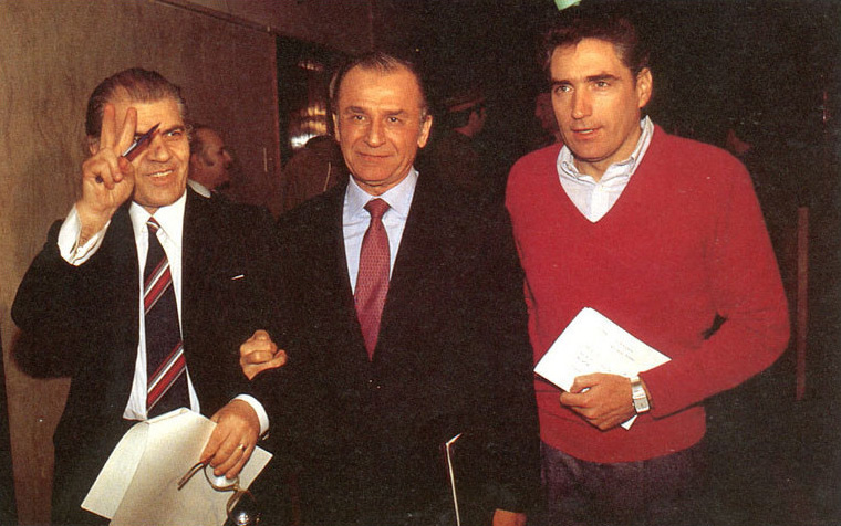 Image prise pendant la Revolution roumaine: Dumitru Mazilu, Ion Iliescu et Petre Roman.